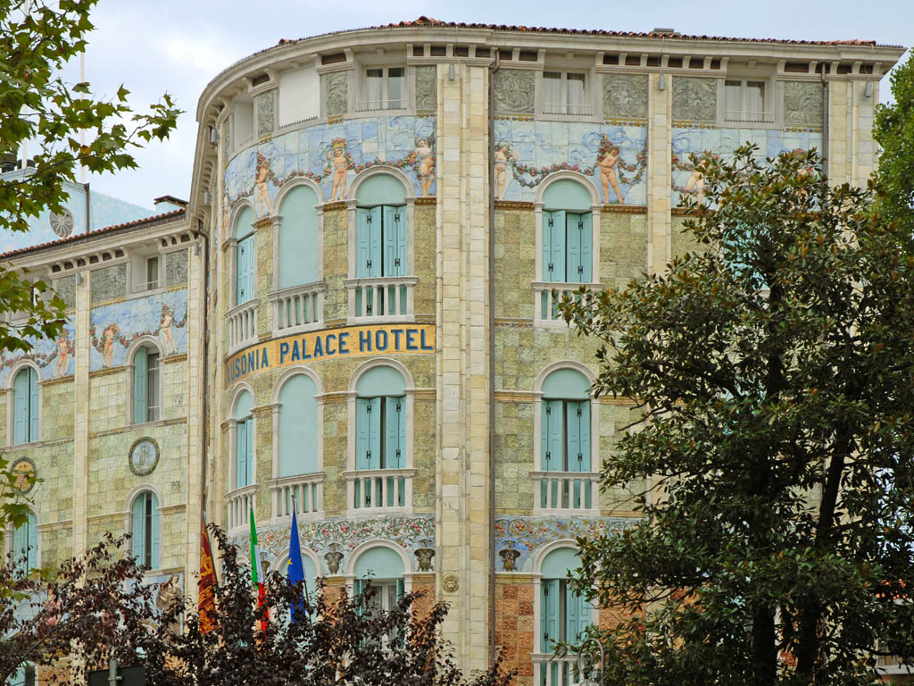 L'hôtel Hungaria Ausonia est de style art nouveau. En Italie, ce style est appelé Liberty.